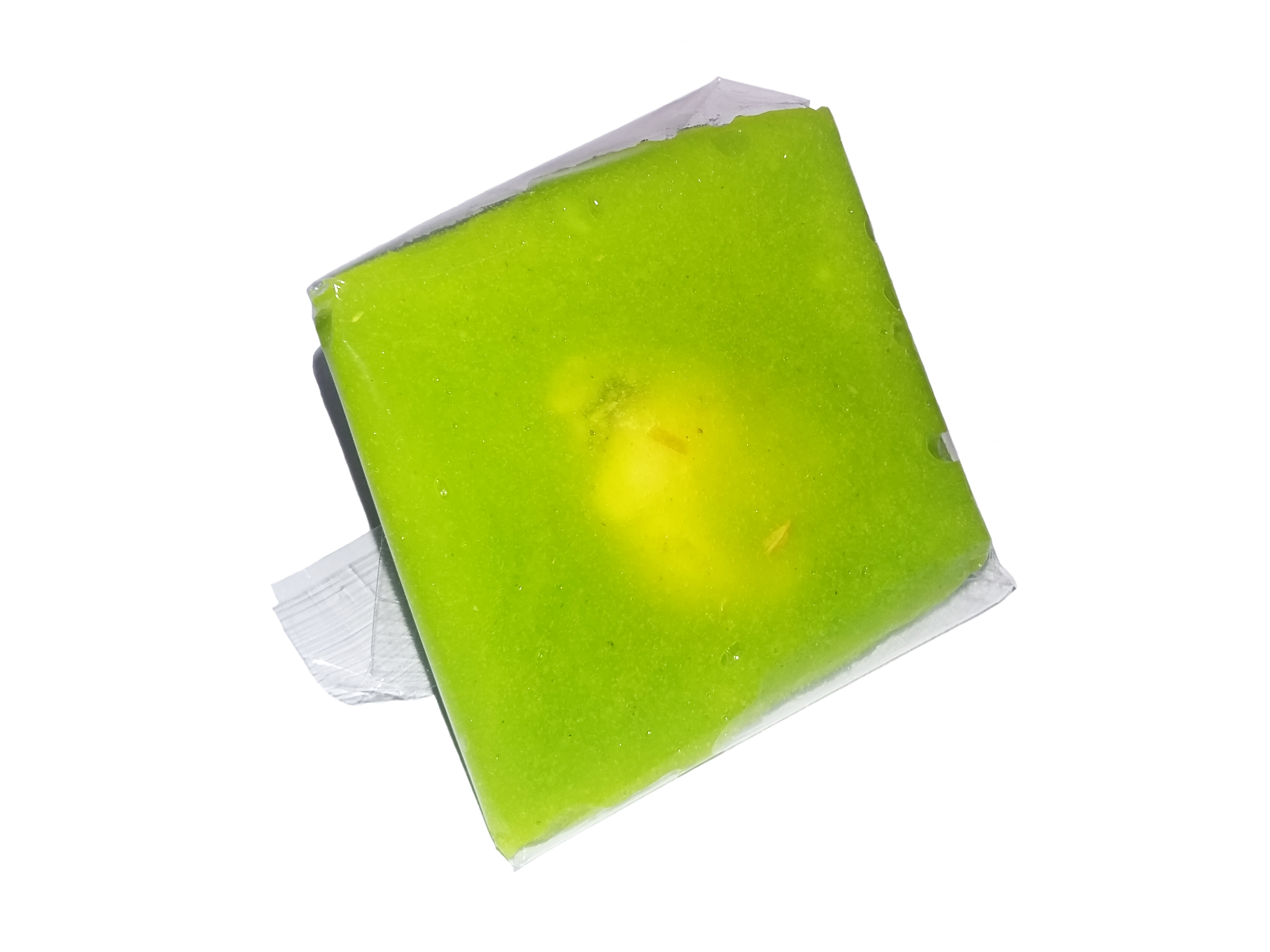 Bánh cốm Hàng Than.